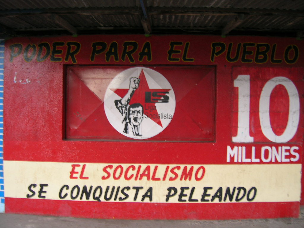 Fachada de una casa del partido venezolano Liga Socialista ubicada en Barcelona.